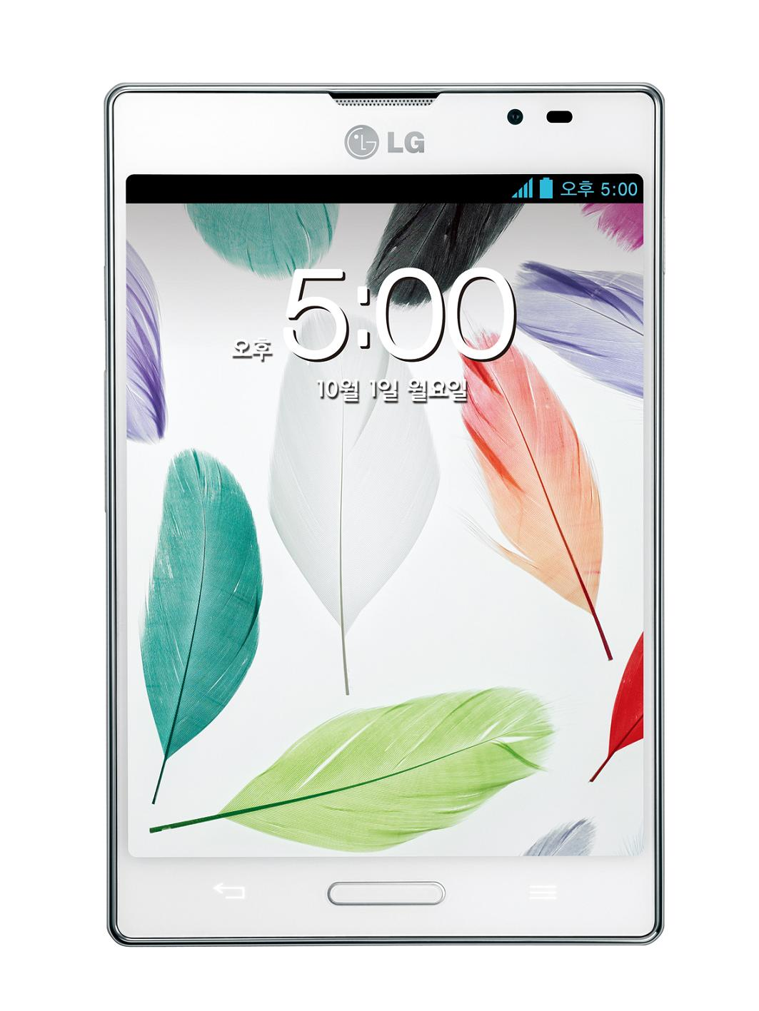 LG전자가 창조적 UX를 대거 탑재한 ‘옵티머스 Vu: Ⅱ’(‘옵티머스 뷰 II’)를 28일부터 이통 3사를 통해 순차 출시한다.